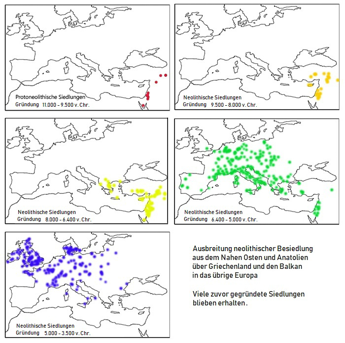 Ausbreitung der neolithischen Kulturen